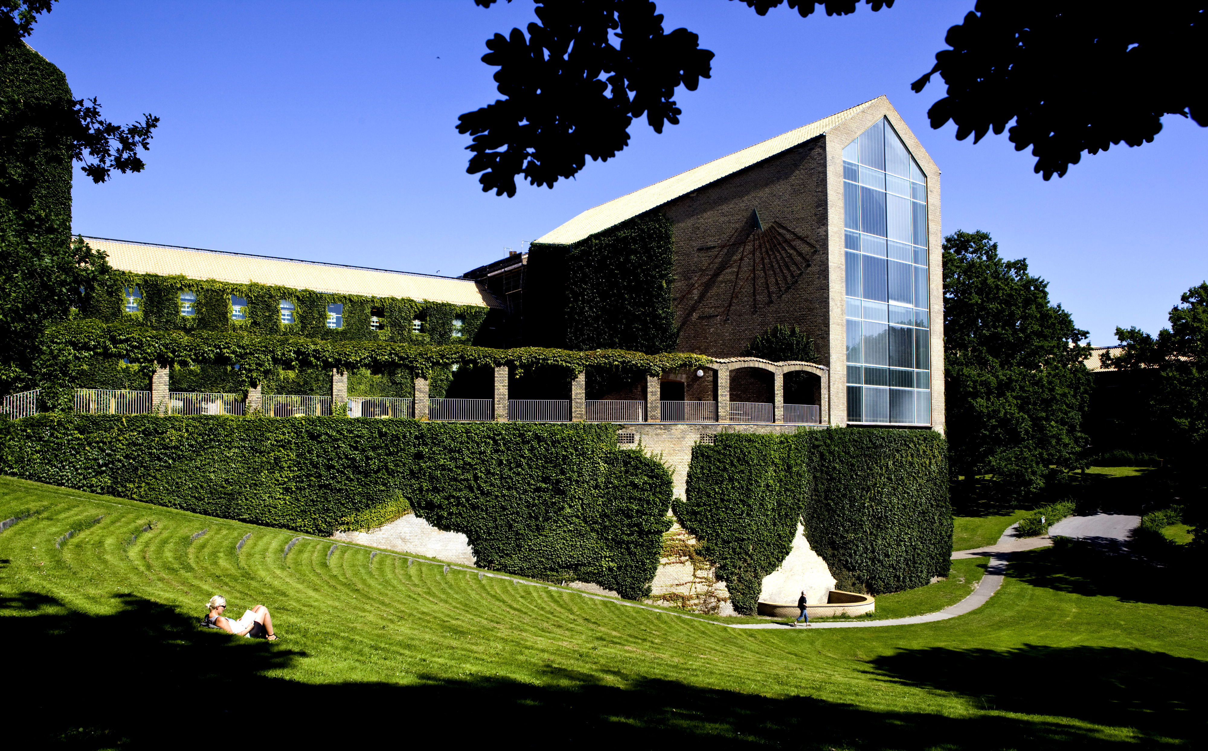 Universitätshauptgebäude